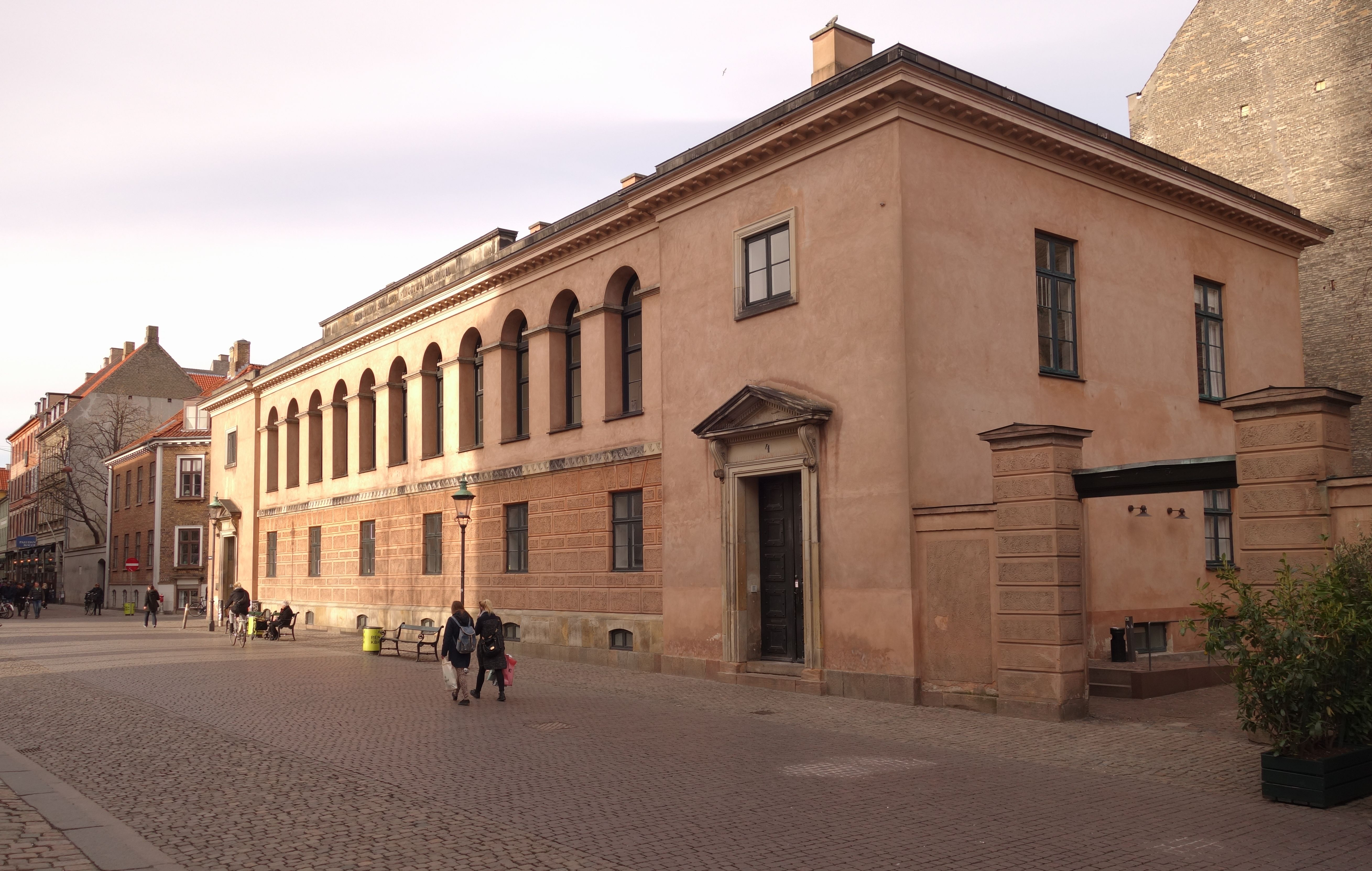 Metropolitanskolen - C.F. Hansen - 1816